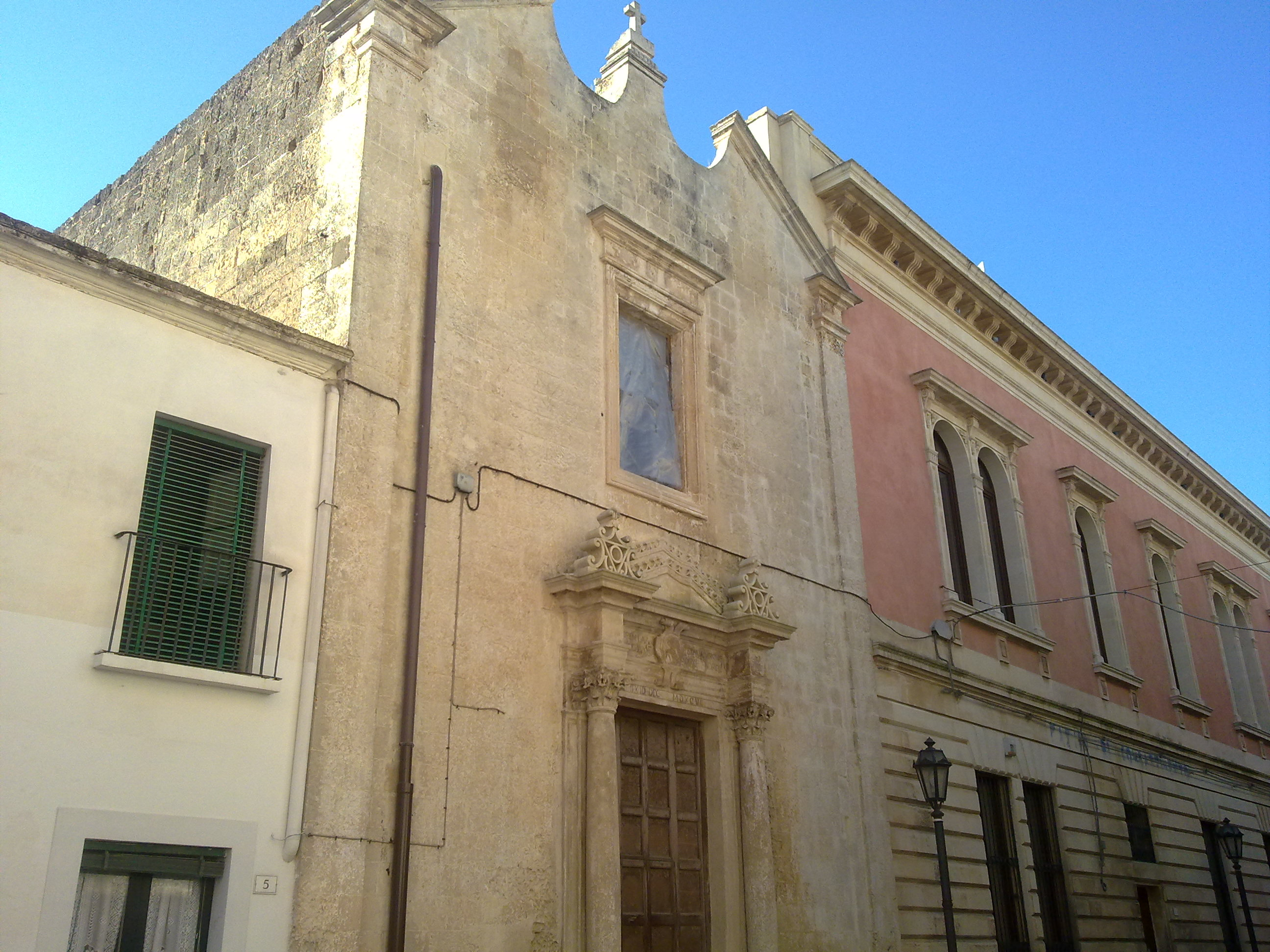 Chiesa Madonna di Loreto Lequile, Lecce